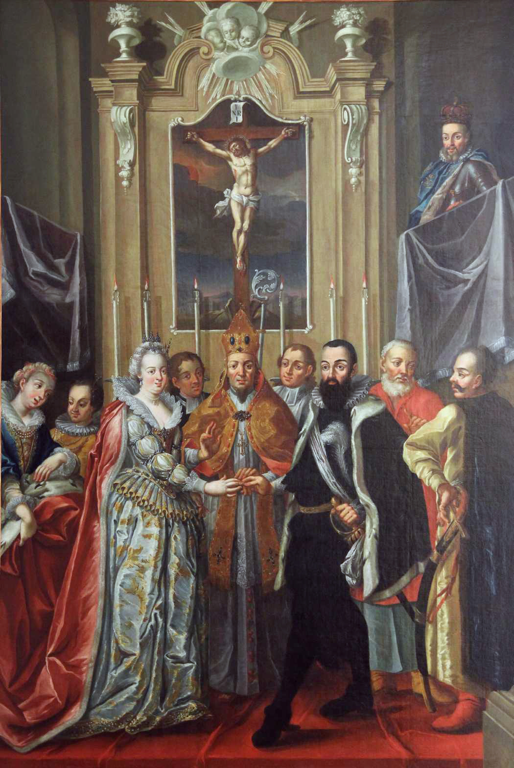 Беларуская (тарашкевіца): Вянчаньне per procura князя Мікалая Радзівіла «Чорнага» (Mikałaj Radzivił «Čorny») і Кацярыны Аўстрыйскай (Kaciaryna Aŭstryjskaja)